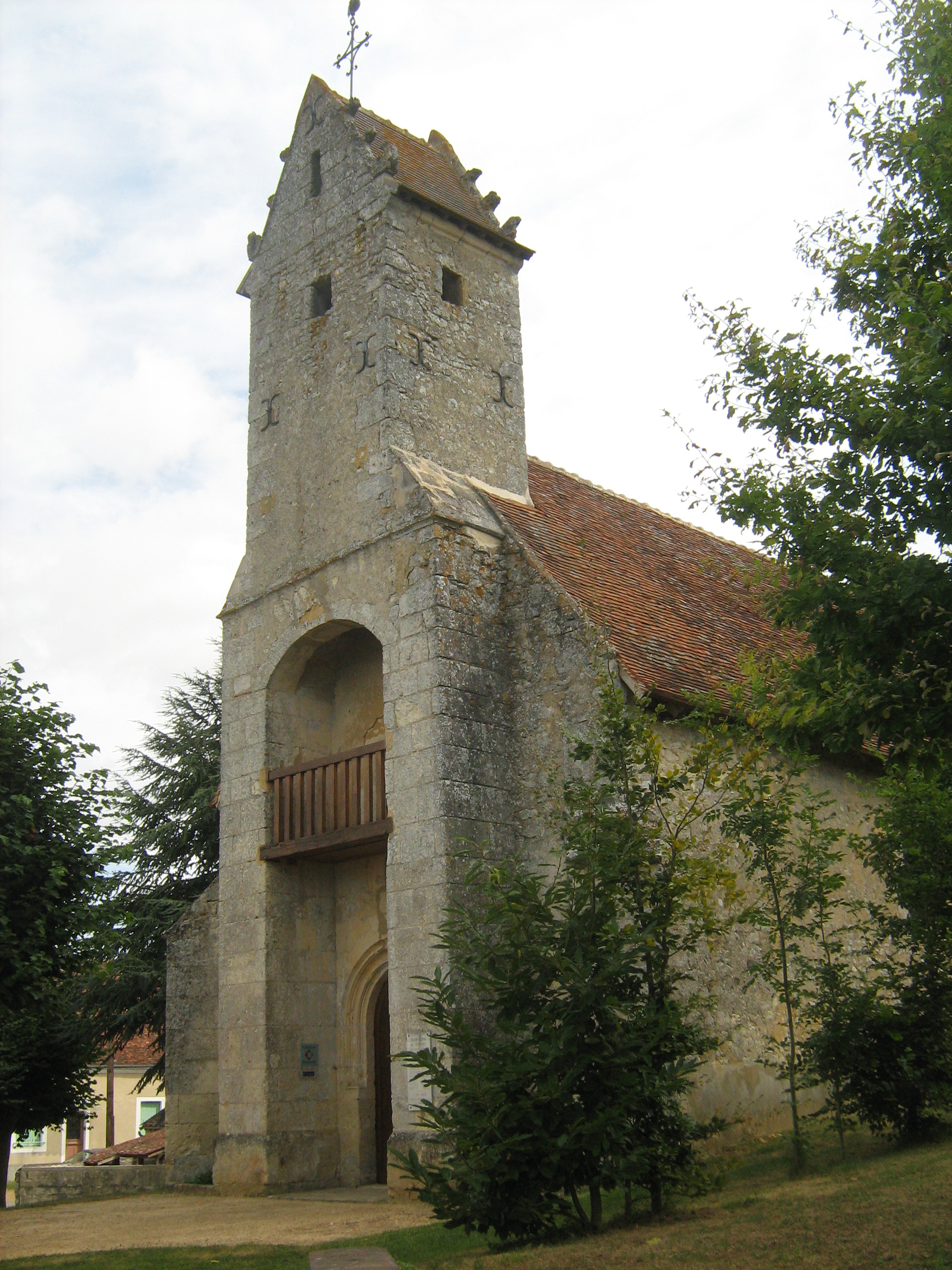 Clocher de l'église Saint-Martin de Gémages, Orne (FRANCE). .